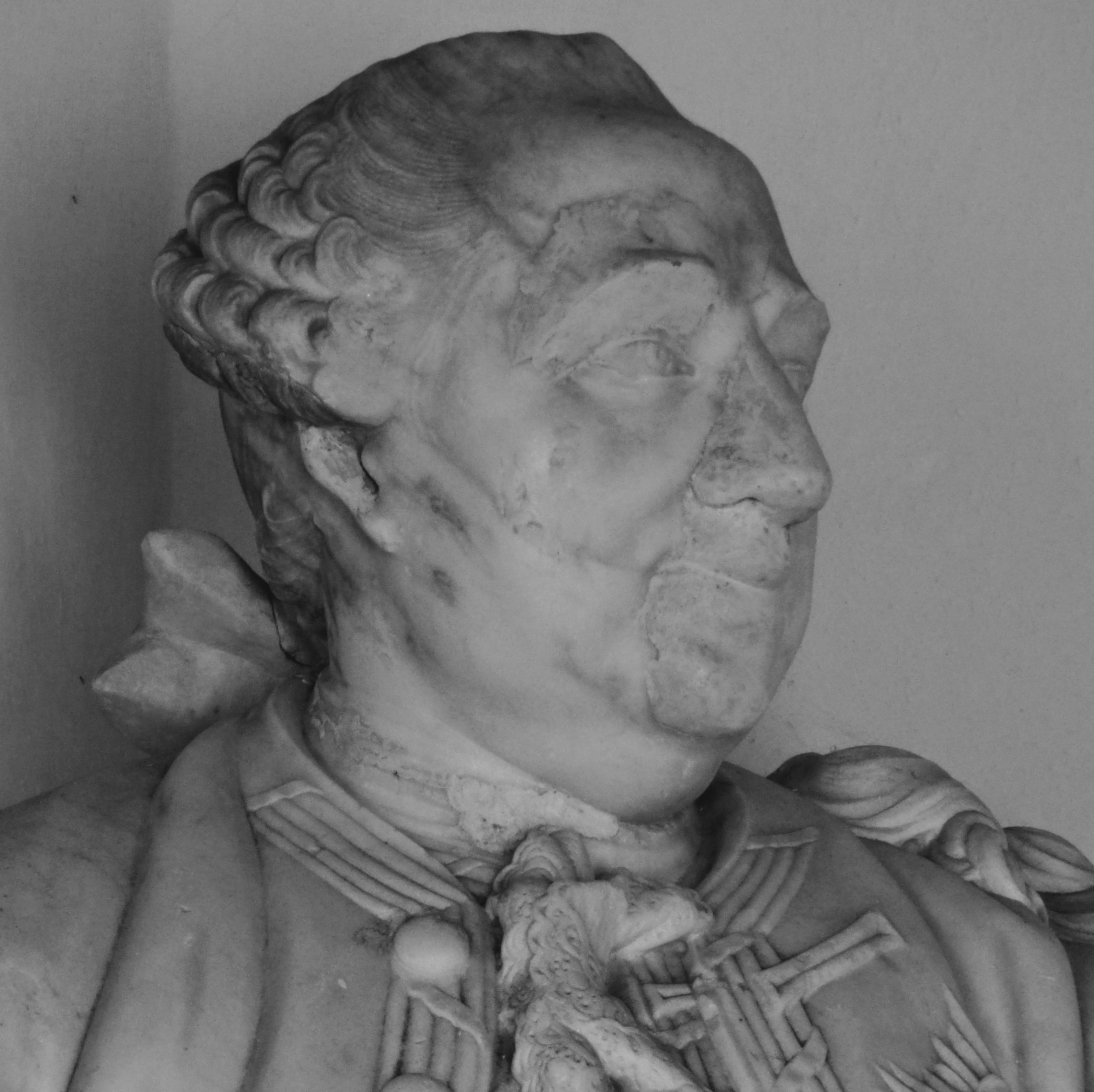 Büste Johann Karl Philipp von Cobenzl, in Predjama